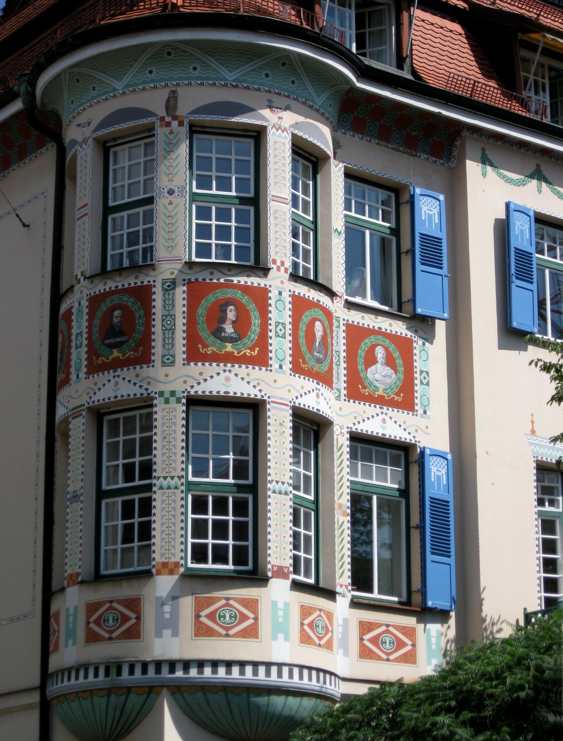 Erker am Haus Georgenstr. 10, München